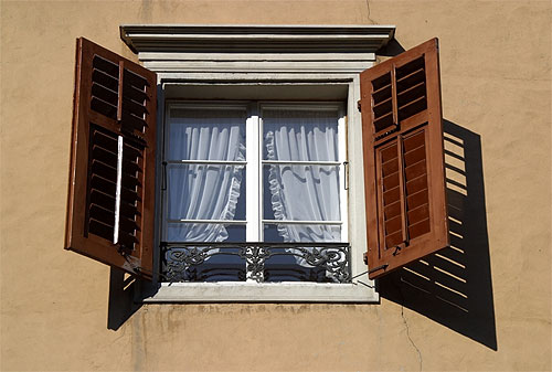 Fenster in der Altstadt von Solothurn